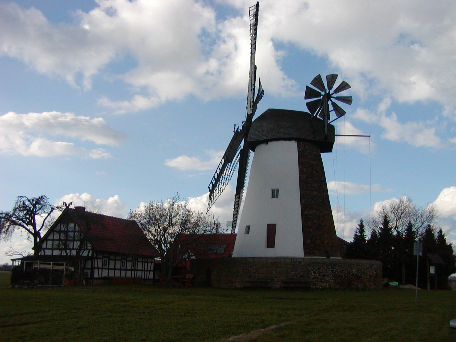 Windmühle Eickhorst This image shows a heritage building in Germany, located in the North Rhine-Westphalian city Hille (no. 10).